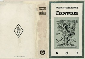 Ferdydurke